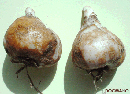 Lilium pumilum bulbs